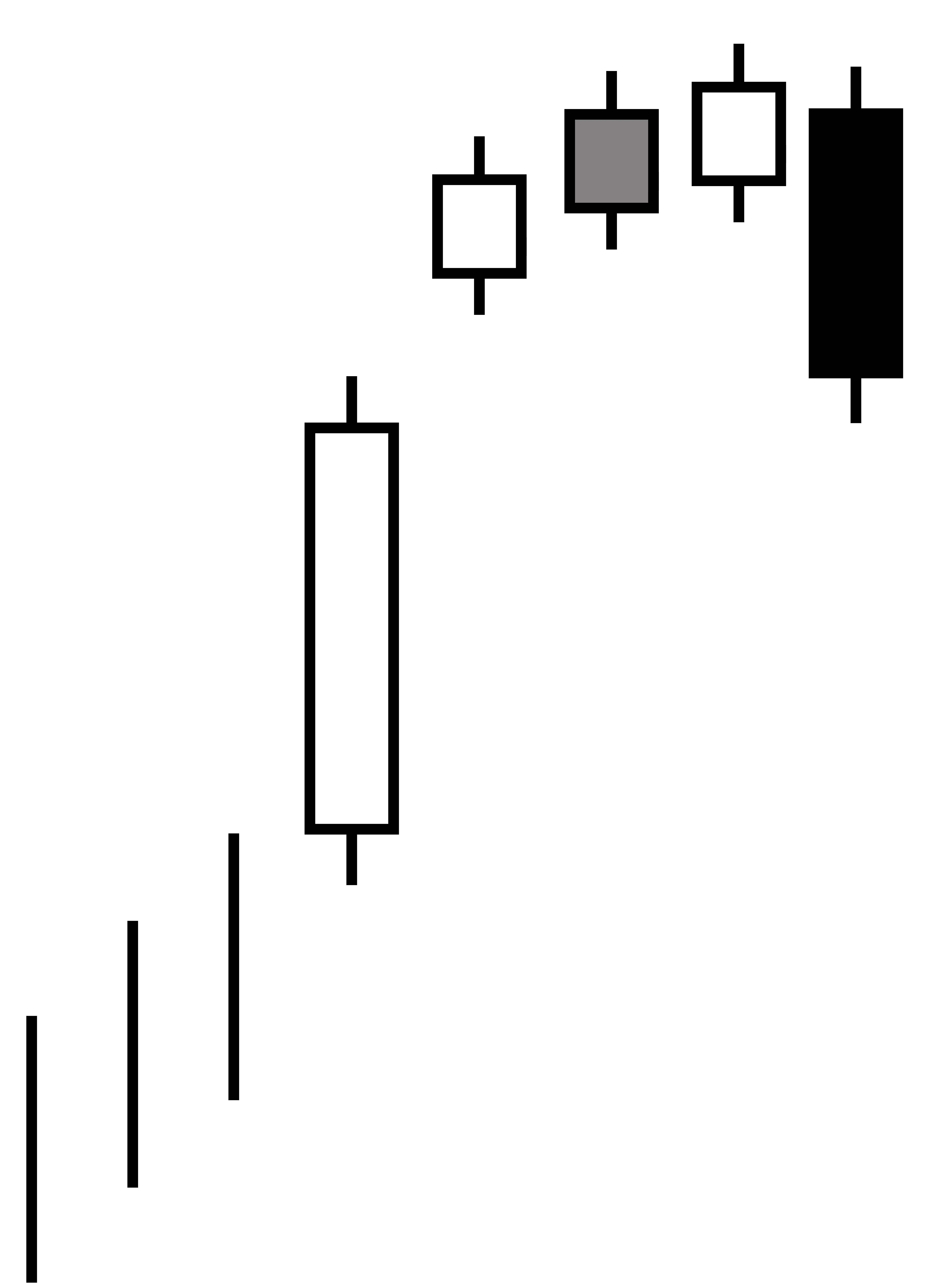 Bearish Breakaway